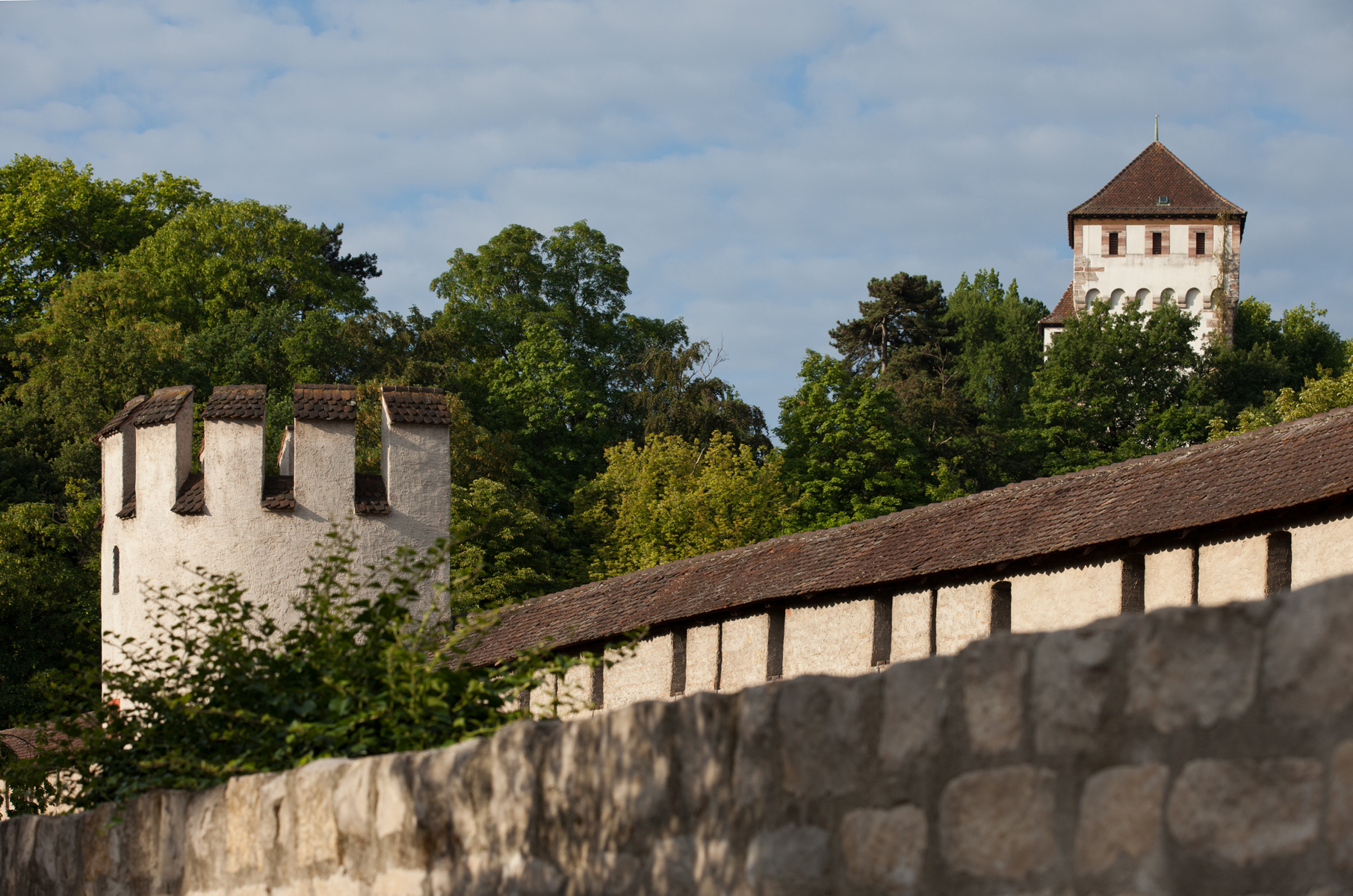 Alte Stadtmauer am Letziplatz in Basel mit Sicht hinauf zum St.Alban-Tor